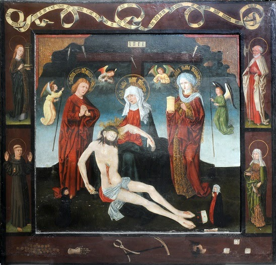 Cette oeuvre qui date de 1490 environ est en cours de restauration dans l'église Sainte-Marie à Berlin. Elle montre le christ quand il descend de la croix.